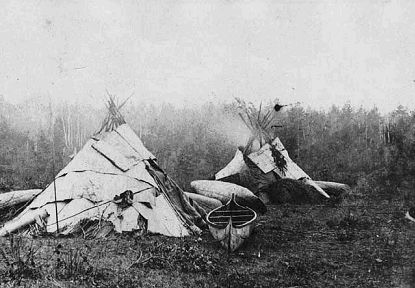 Ojibwe camp in 1870